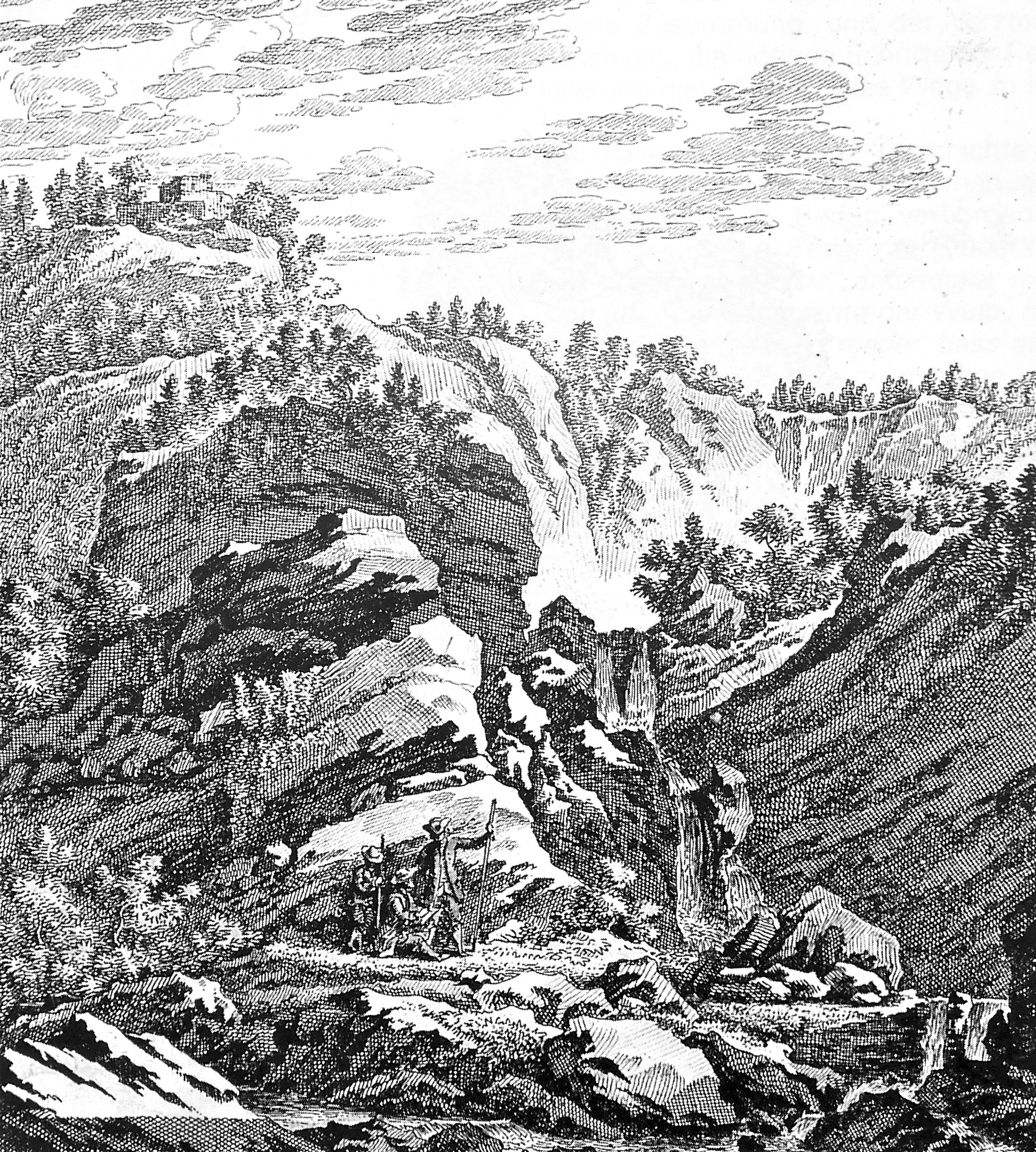 Ruine Wulp Zeichnung von Johann Balthasar Bullinger